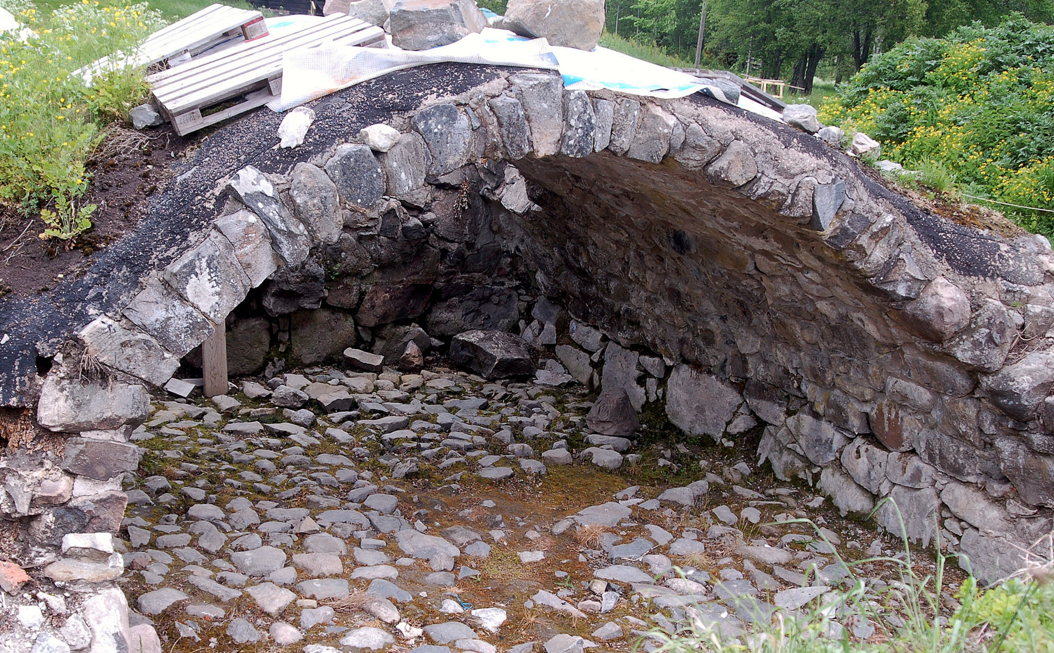 Dubbelkällaren i bodarne är en ruin efter Antonitordens kloster vid Ramundeboda.